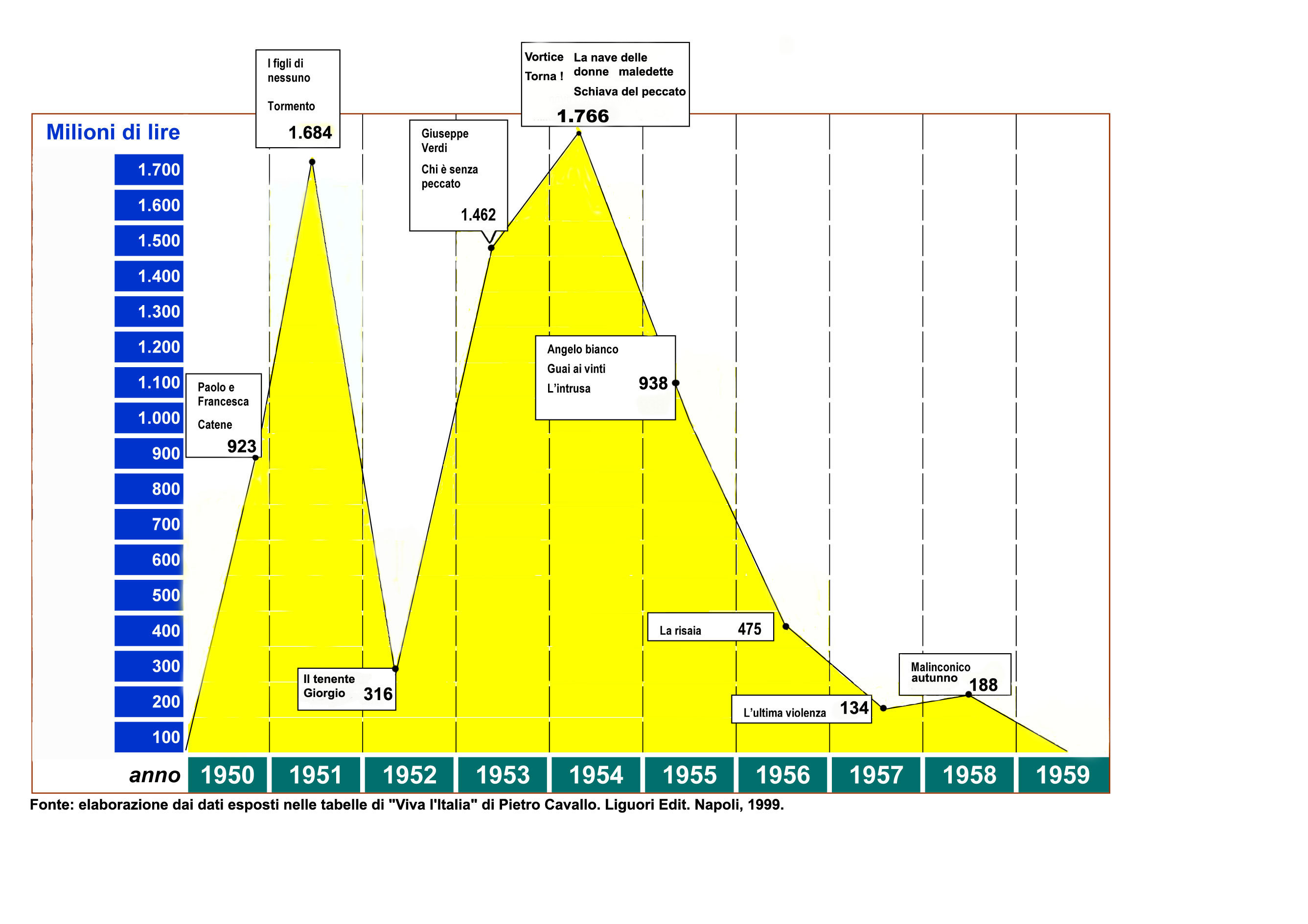 gli incassi dei film di Raffaello Matarazzo negli anni Cinquanta